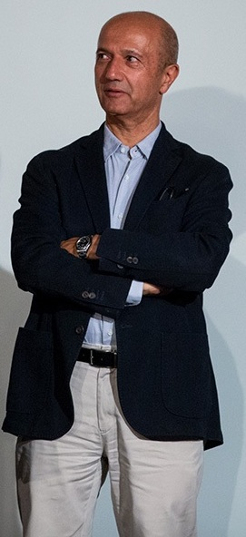 کاوه کاظمی در اختتامیه سومین دوره نشان عکس سال مطبوعاتی ایران